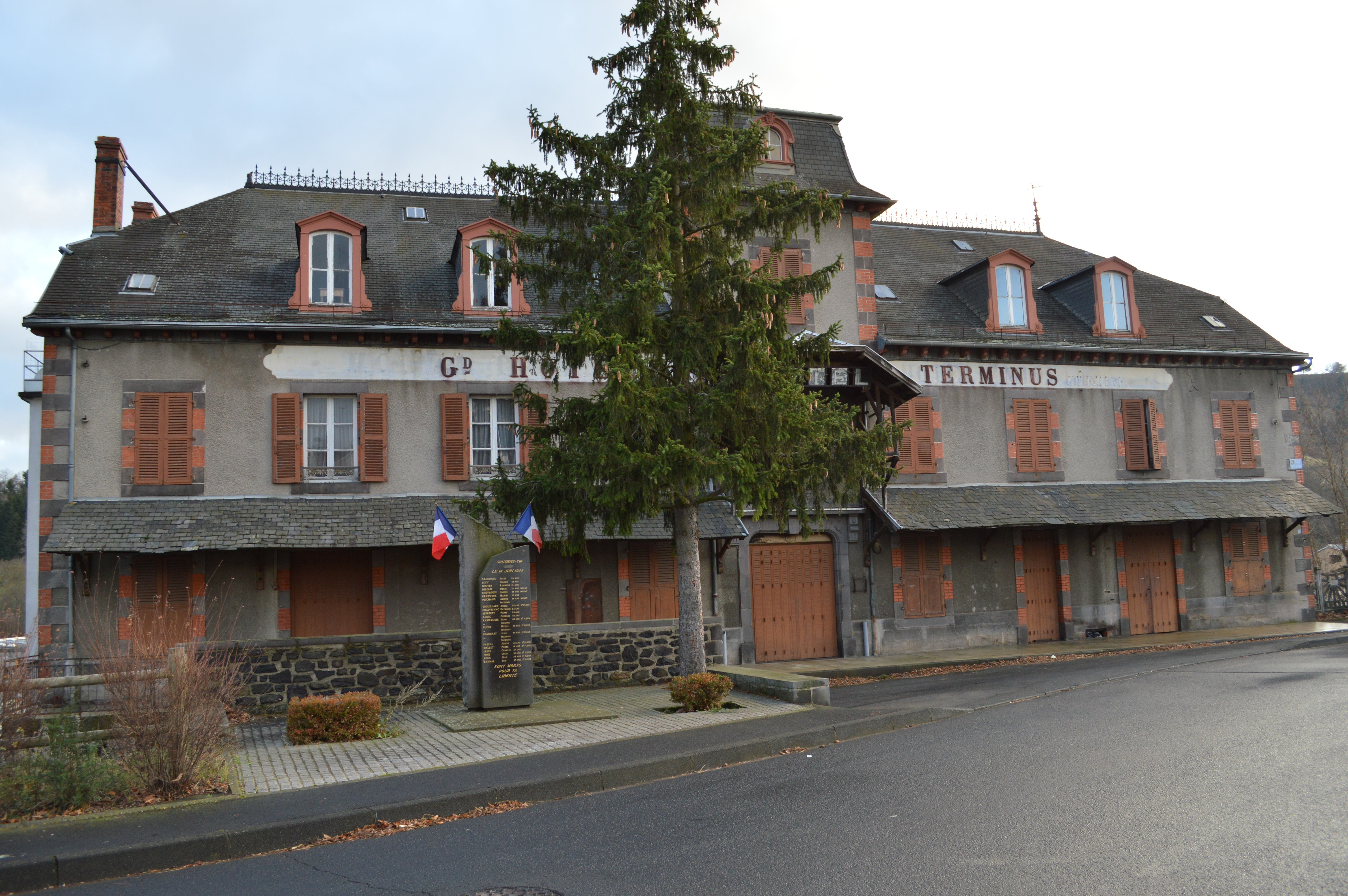 Hotel Terminus et monument aux morts à Saint-Flour